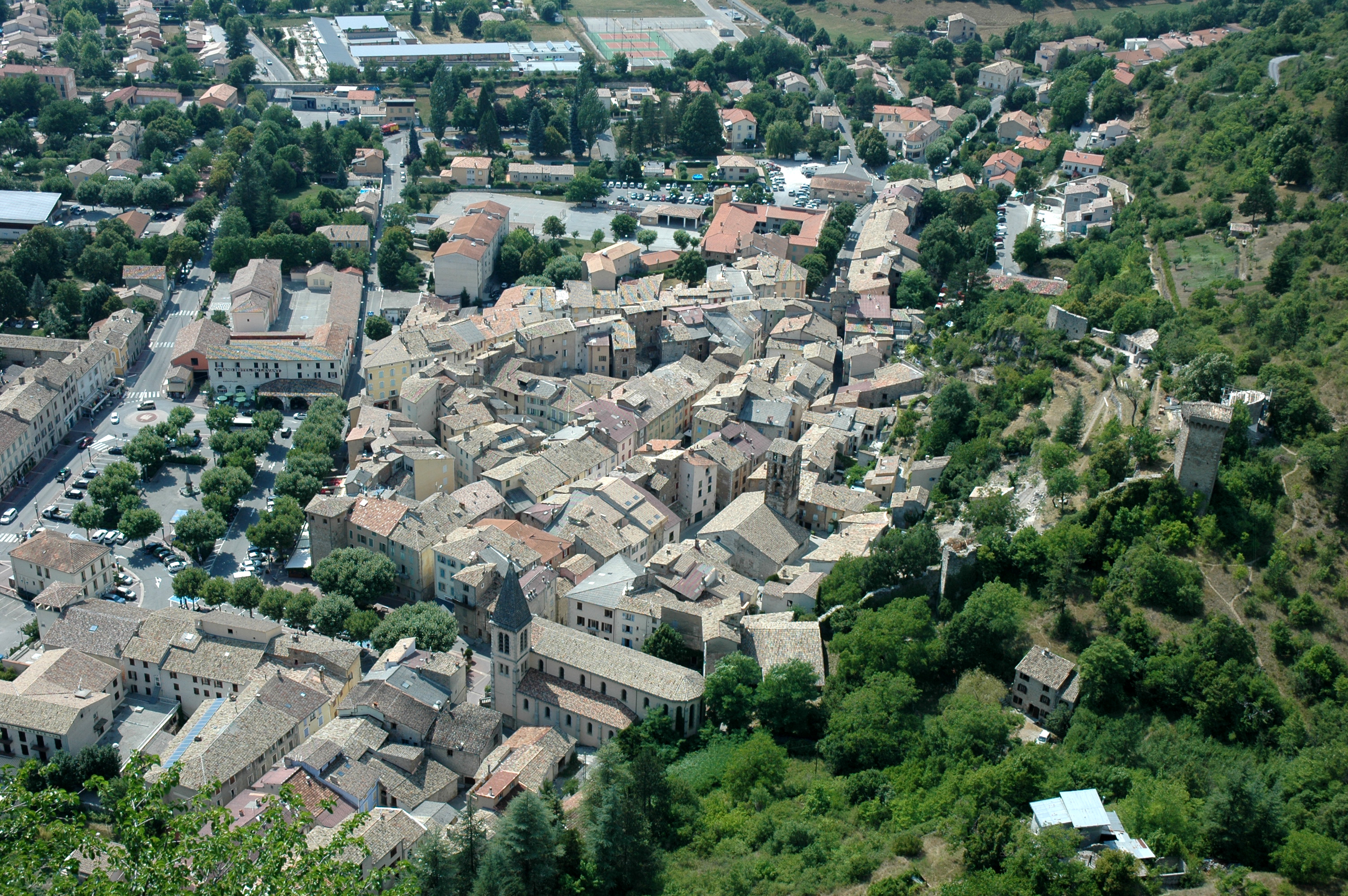 Castellane